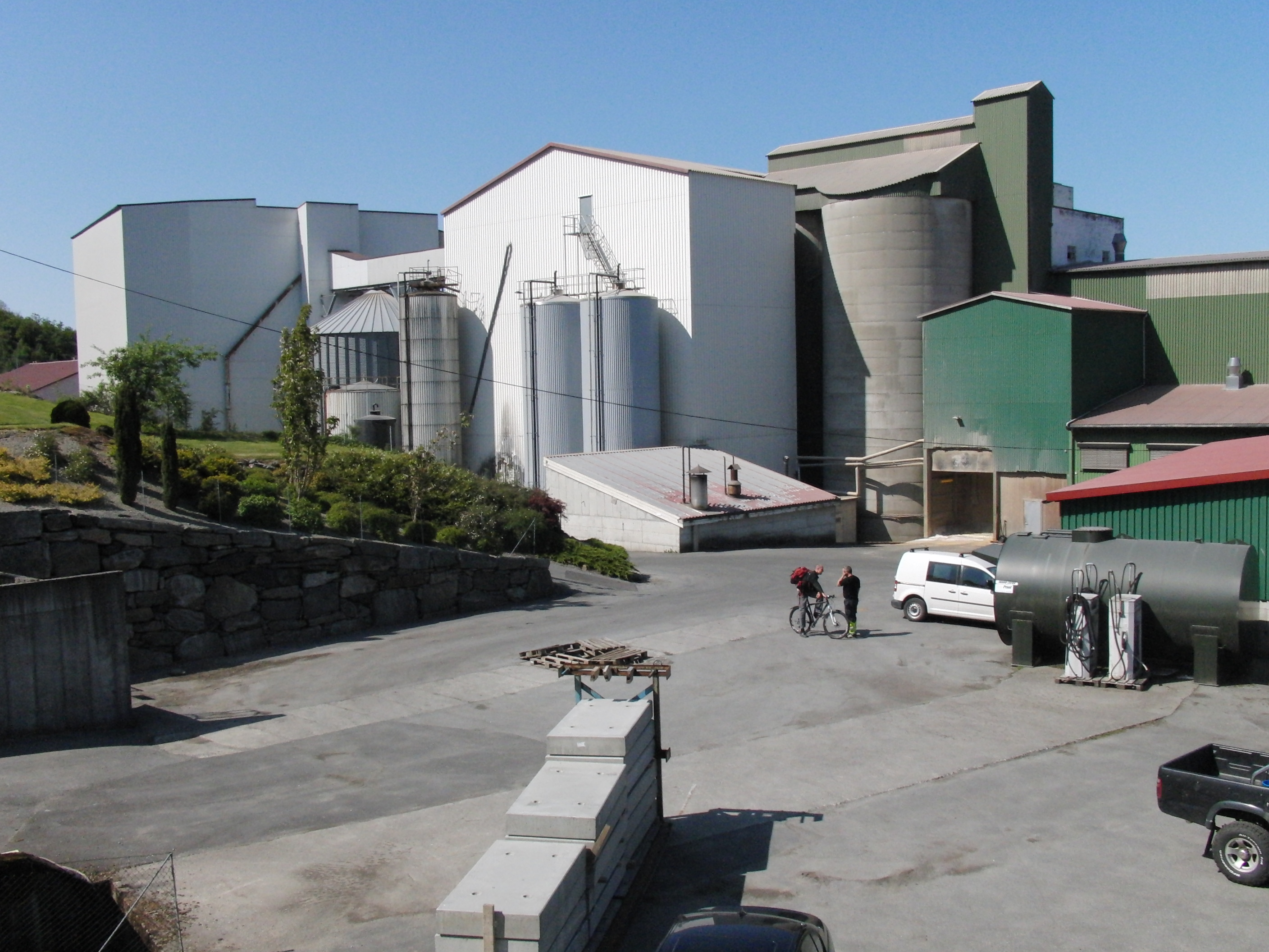 Fiskå Mølle, Strand